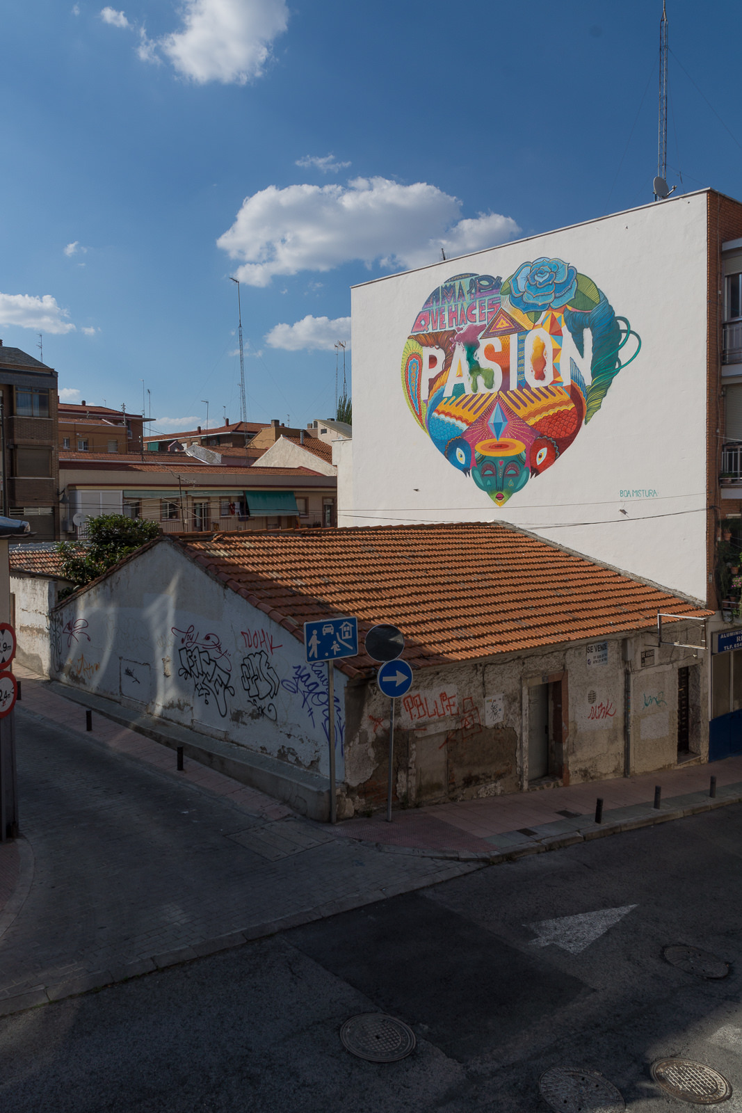 Alcobendas, Comunidad de Madrid, España.